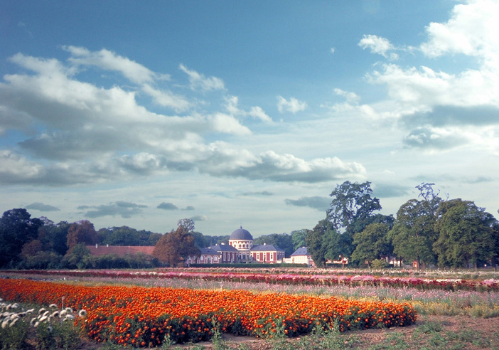 Zámek Veltrusy - Park ve stylu tzv. "Okrasného statku", "ferme ornée"